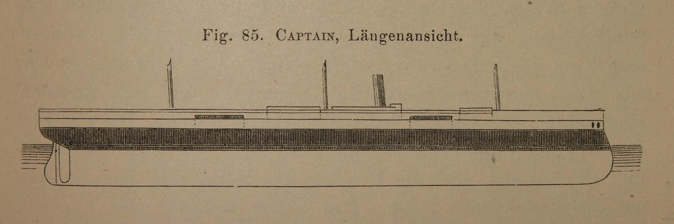 HMS Captain aus: von Kronenfels, J. F.: Das schwimmende Flottenmaterial der Seemächte. Eine kurzgefasste Beschreibung der wichtigsten europäischen, amerikanischen und asiatischen Kriegsschiffe der neueren und neuesten Zeit. A. Hartleben's Verlag, Wien. Pest. Leipzig 1881.